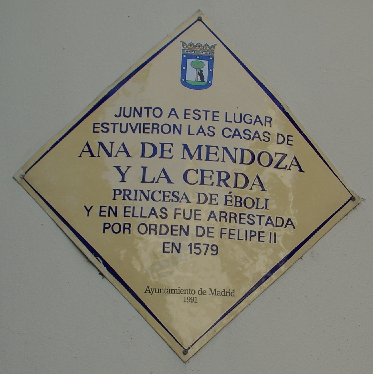 VIEW : ®'s / DiDi / RM / Ð 6K / ┼ : MADRID CALLE MAYOR_EDIFICIOS